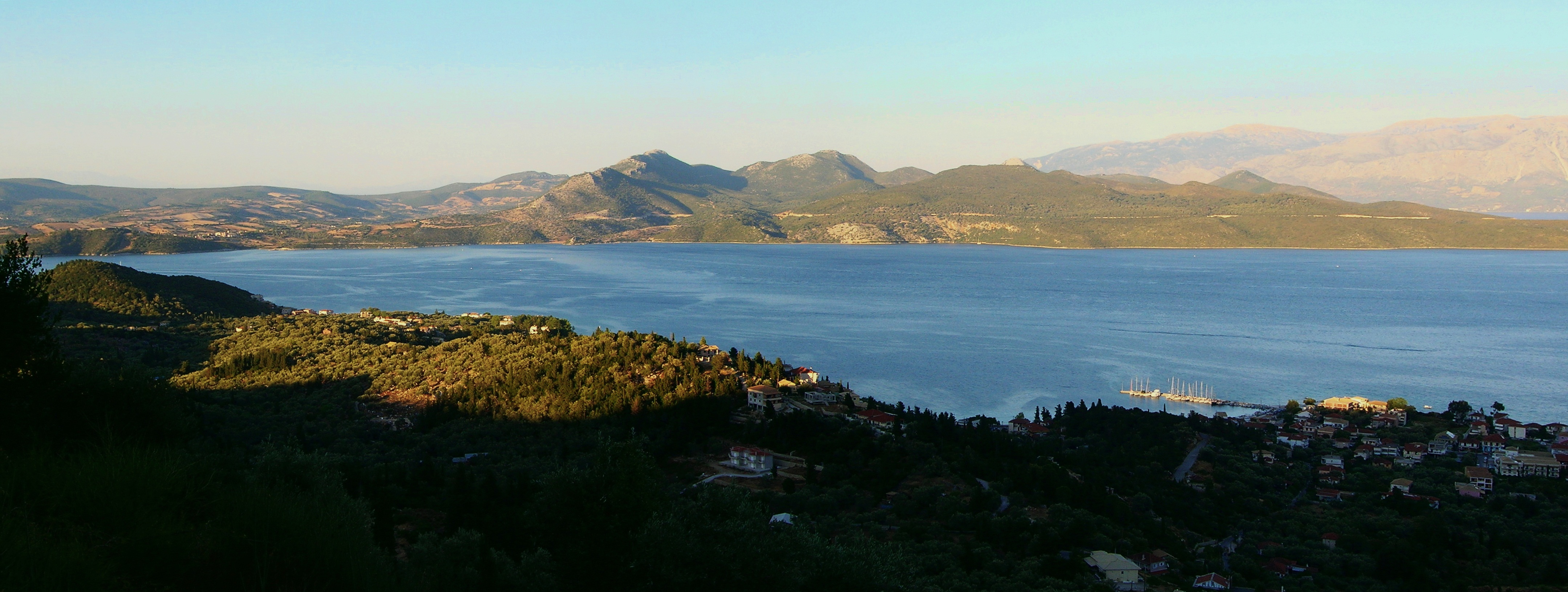 Lefkada, Greece